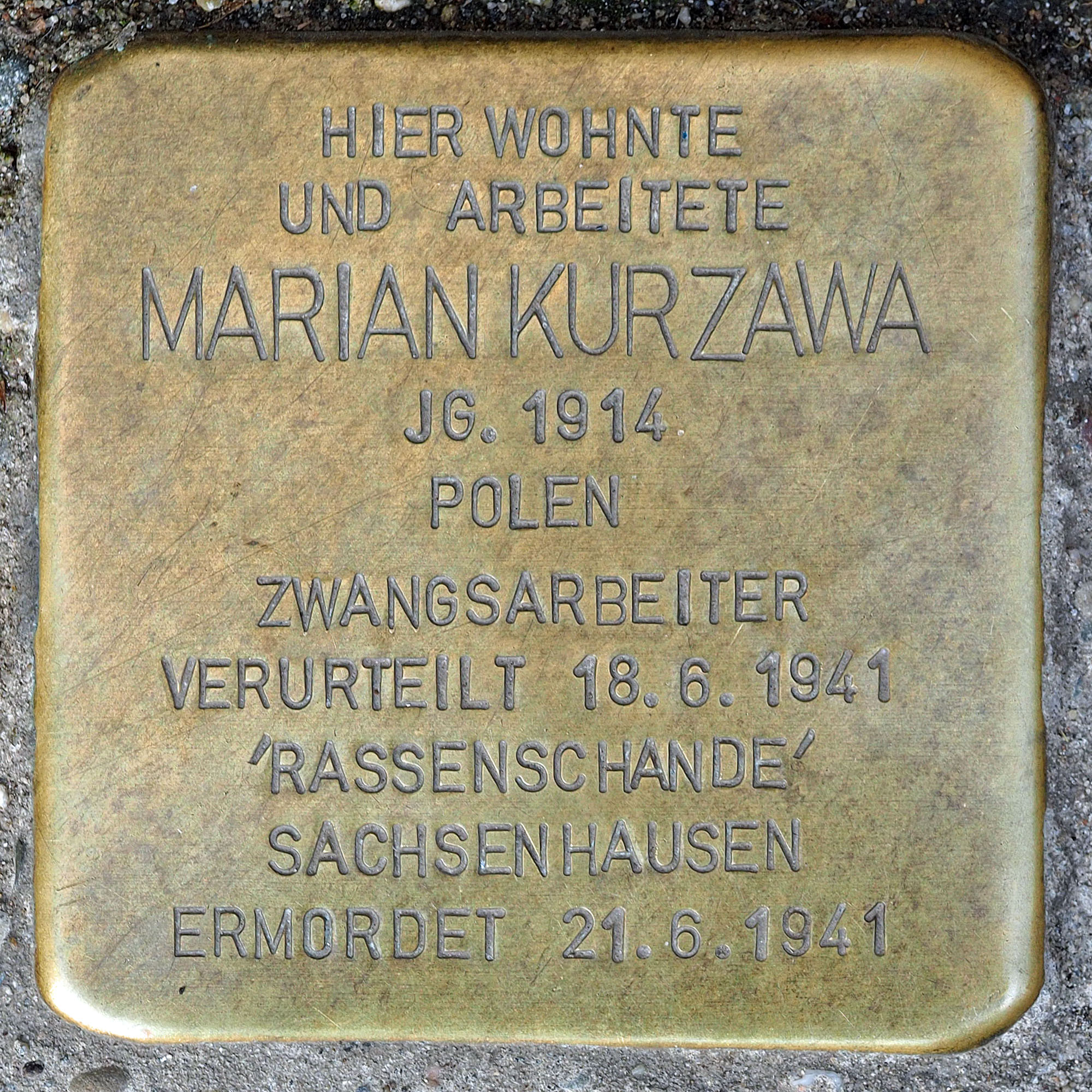 Stolpersteine in Kempen: Marian Kurzawa, Engerstraße 21